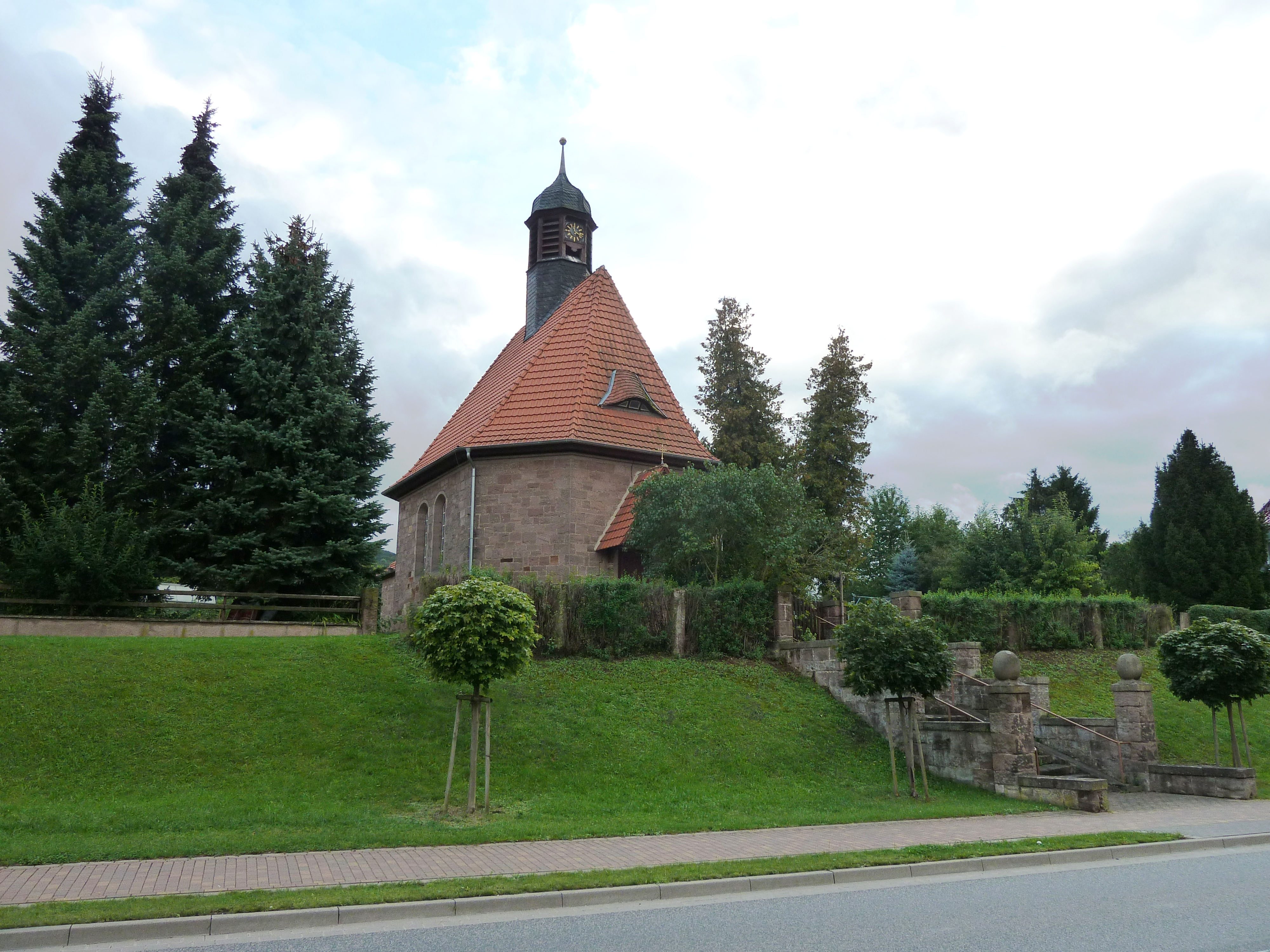 Evangelische Christuskirche in Uder, Landkreis Eichsfeld. Eingeweiht am 29. Juni 1928